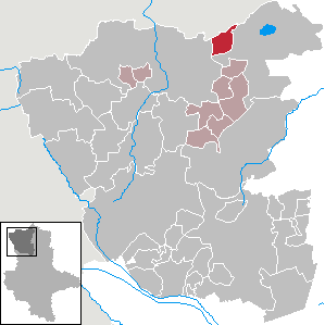 (Original text: Mechau im Altmarkkreis Salzwedel)